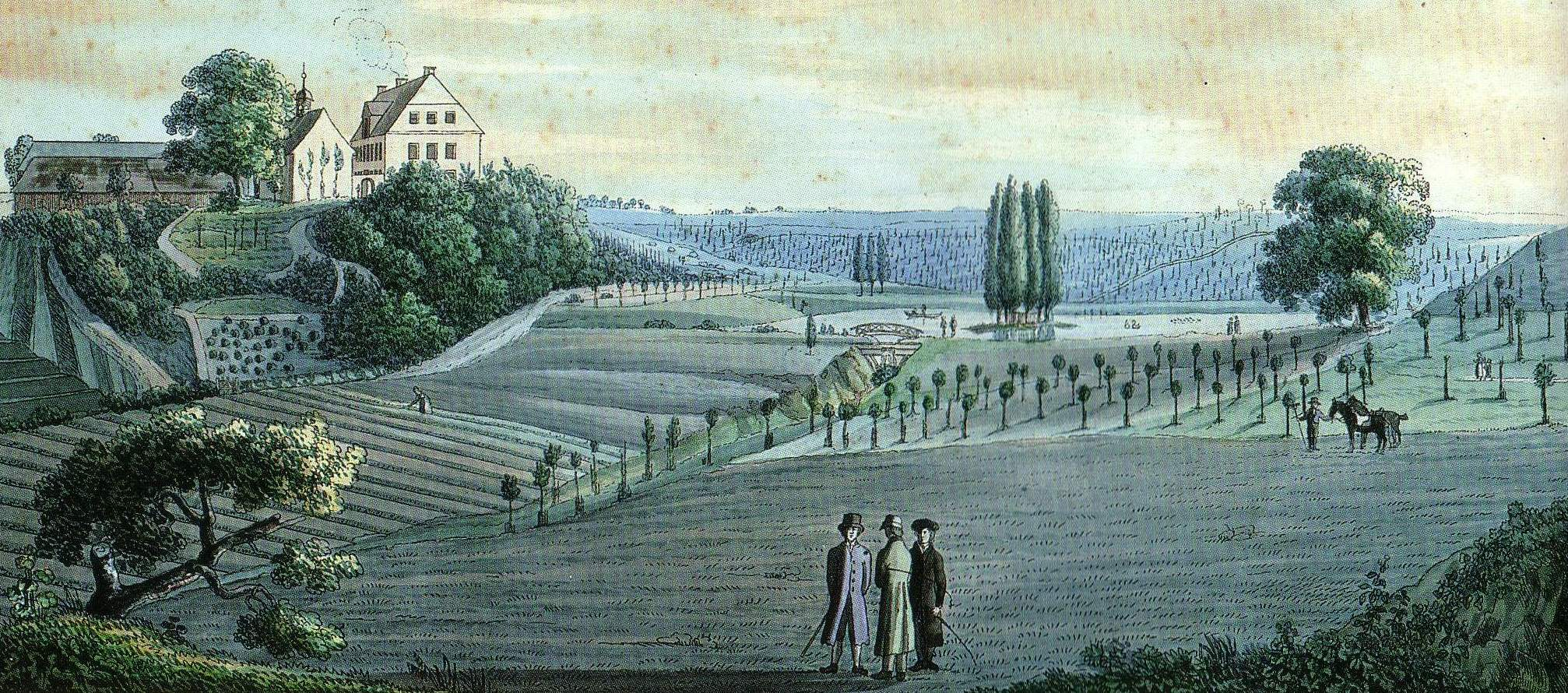 Kupferstich, etwa 1820, Glüsig bei Althaldensleben